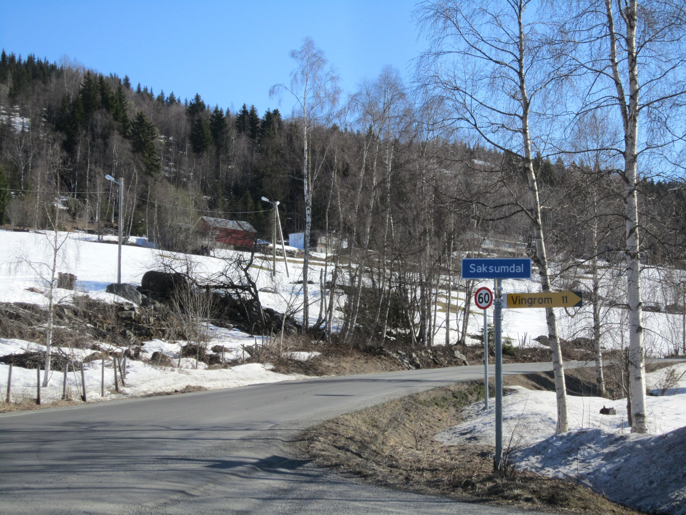 Krysset mellom fylkesvei 2524 og 2518 (tidl. 313 og 310) i Saksumdal